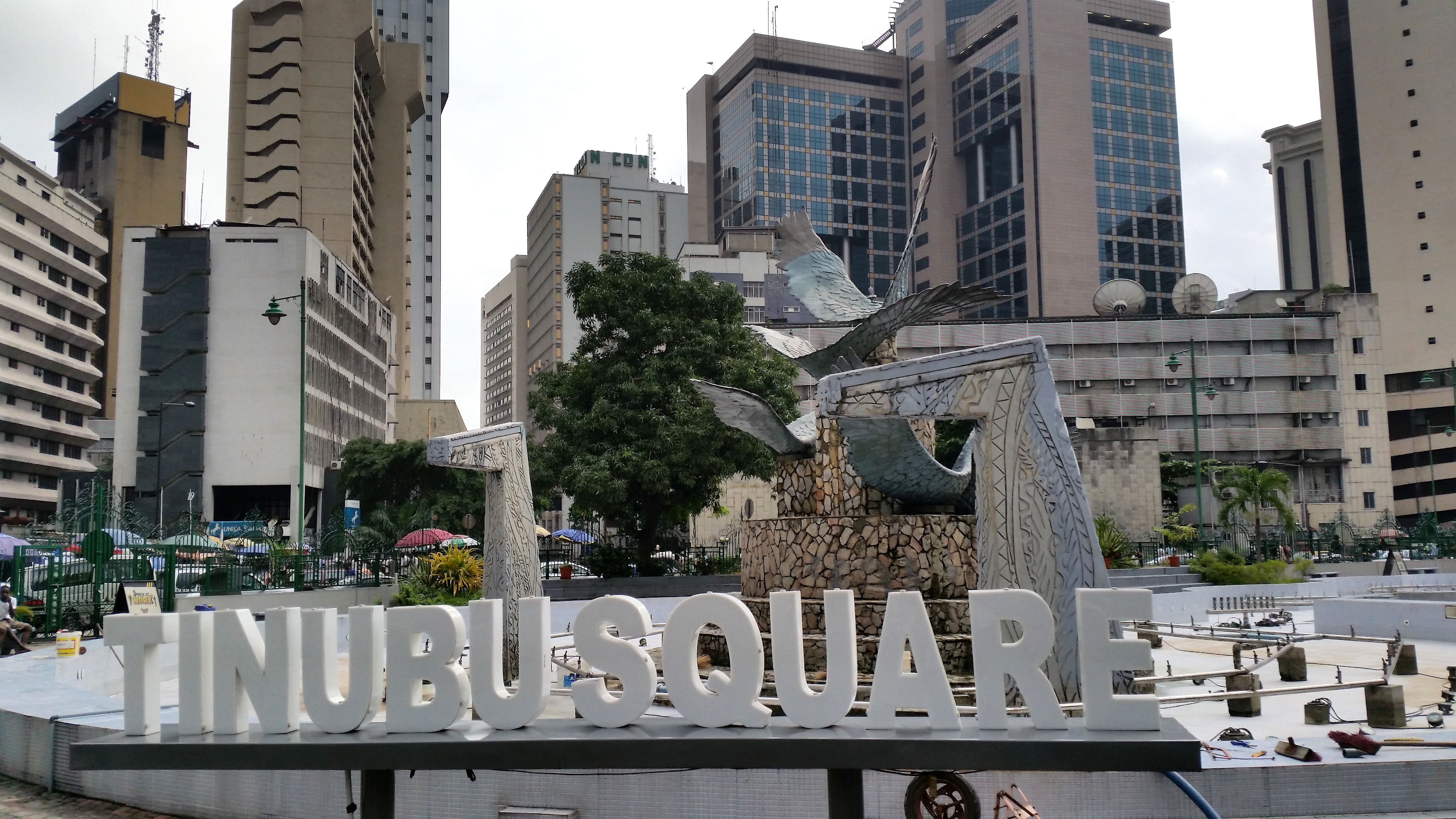 Tinubu Square, Lagos, Nigeria